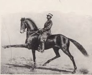 L'écuyer français du Cadre noir Etienne Beudant et son cheval Anglo-barbe Robertsart II au trot en extension soutenu